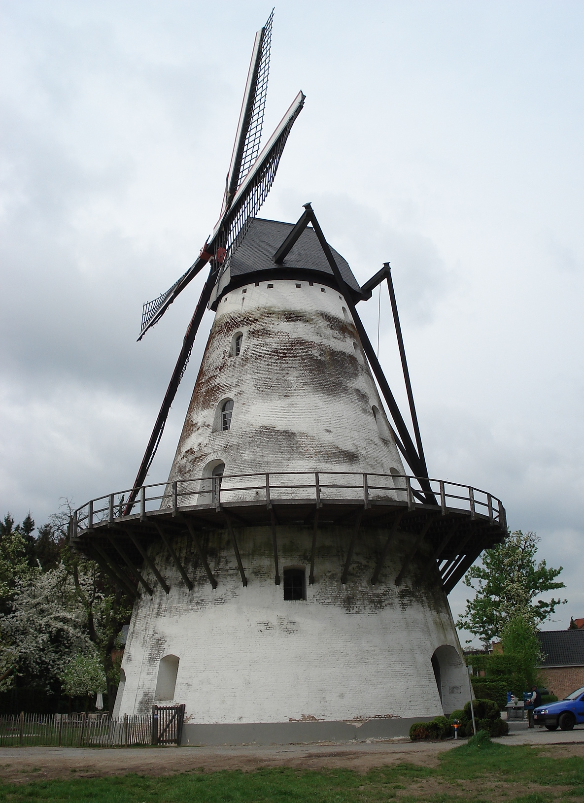 Boechout bij Antwerpen. De Steenen Molen.